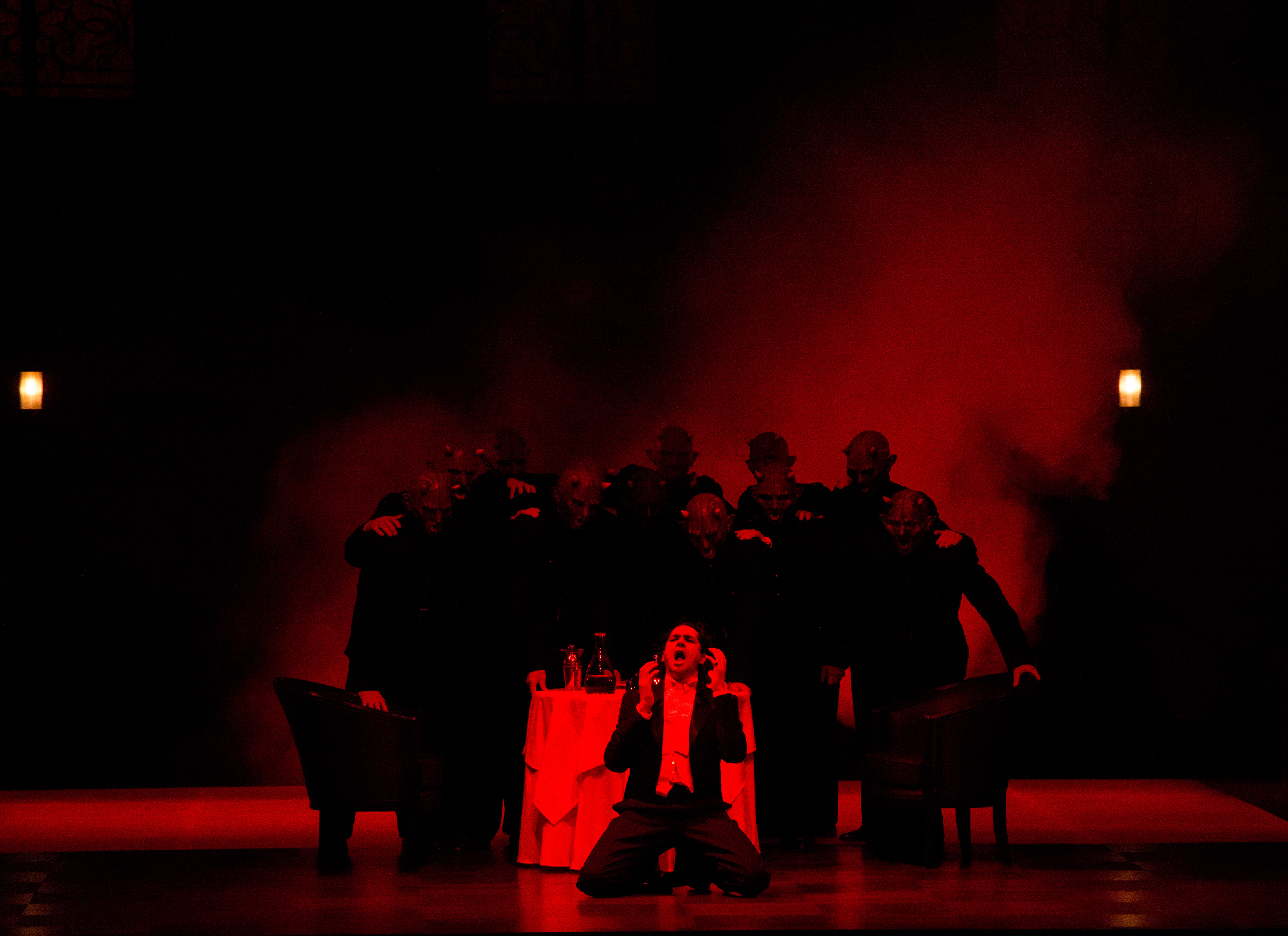 Don Giovanni, with Ildebrando D'Arcangelo, Salzburg Festival 2014